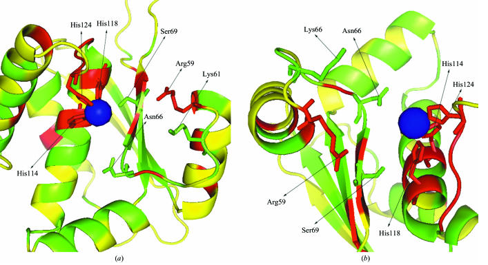 YbeY proteiini sekundaarne struktuur, kus sinine täpp on metalliioon (nikkel), mis on ümbritsetud 3 histidiinijäägiga (His114, His124, His118) ja arginiiniga (Arg59)